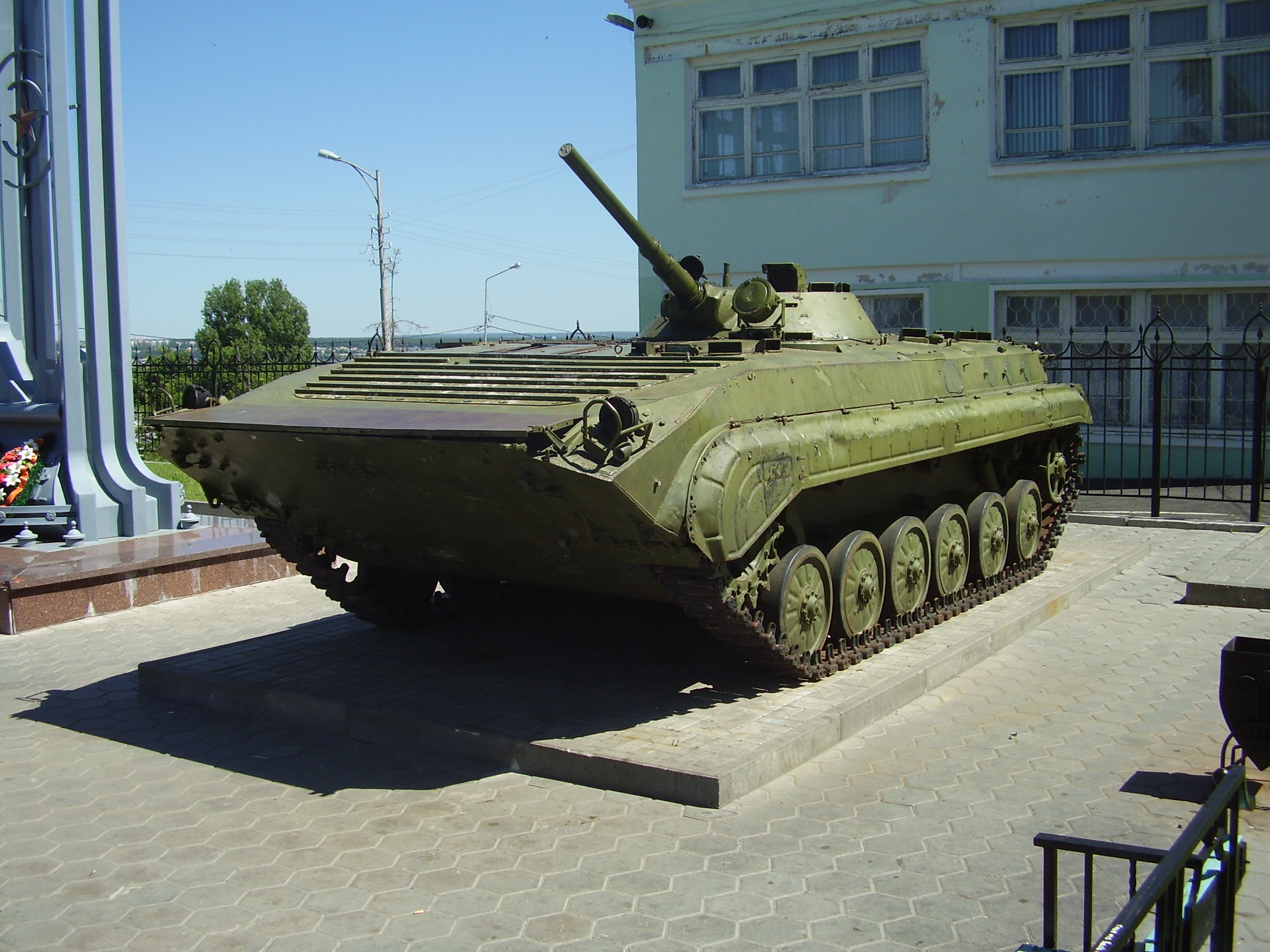 г.Старый Оскол. Памятник-танк